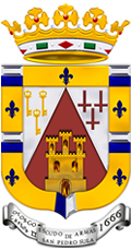 Escudo de la Municipalidad de San pedro Sula